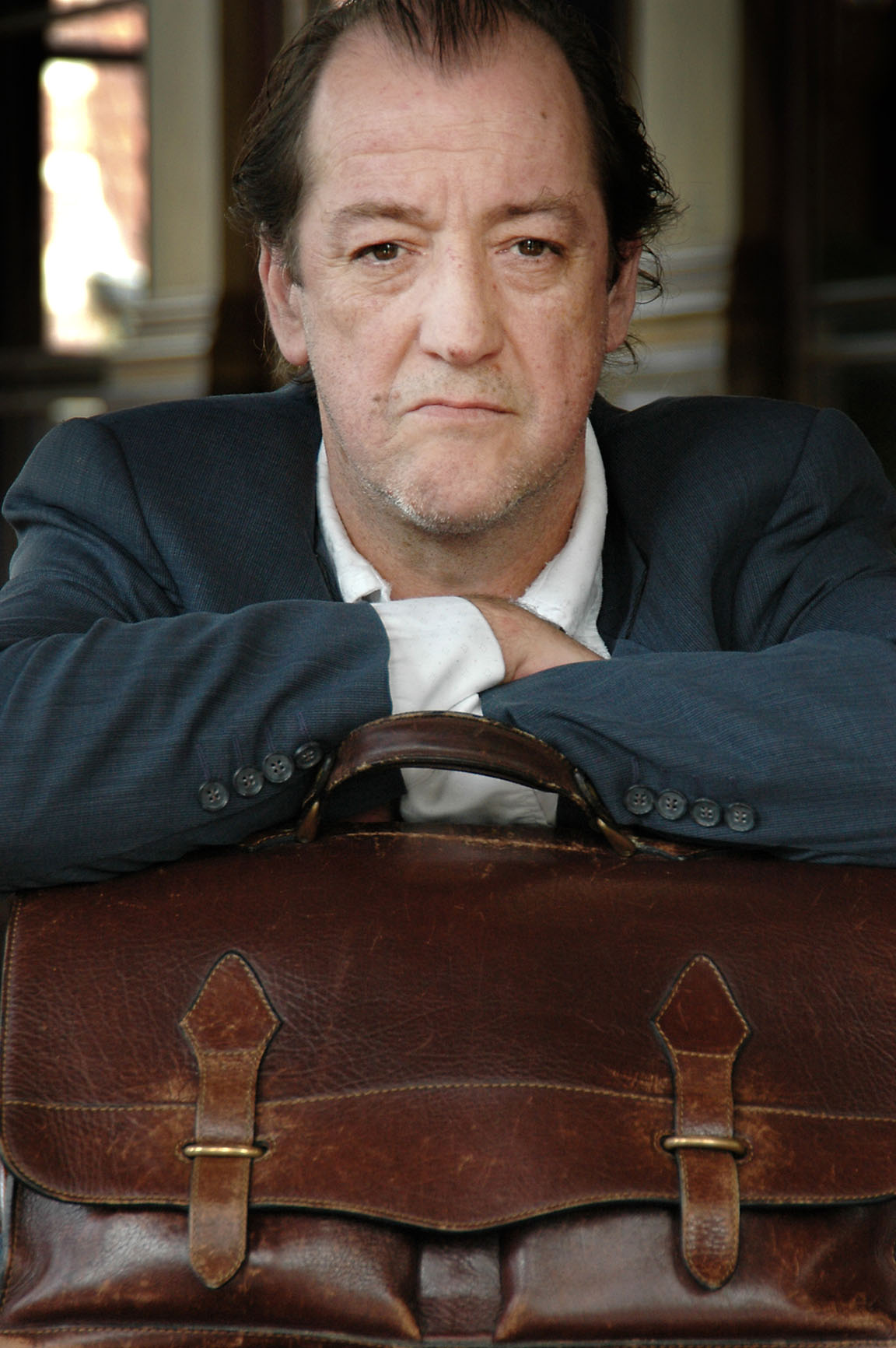 Acteur Josse De Pauw